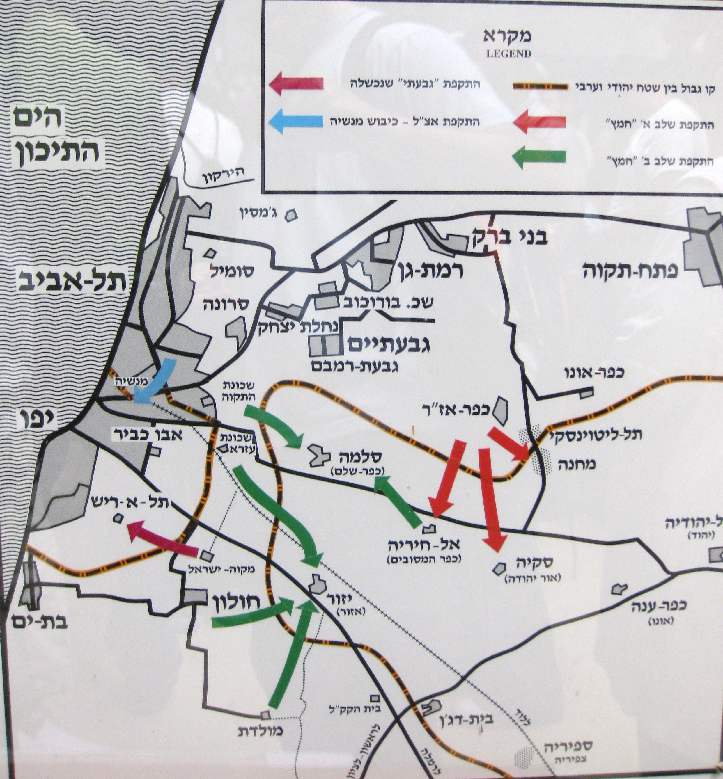 Beit Gidi Exhibits מוצגים בבית גידי - מוזיאון האצל בתש"ח מבצע חמץ